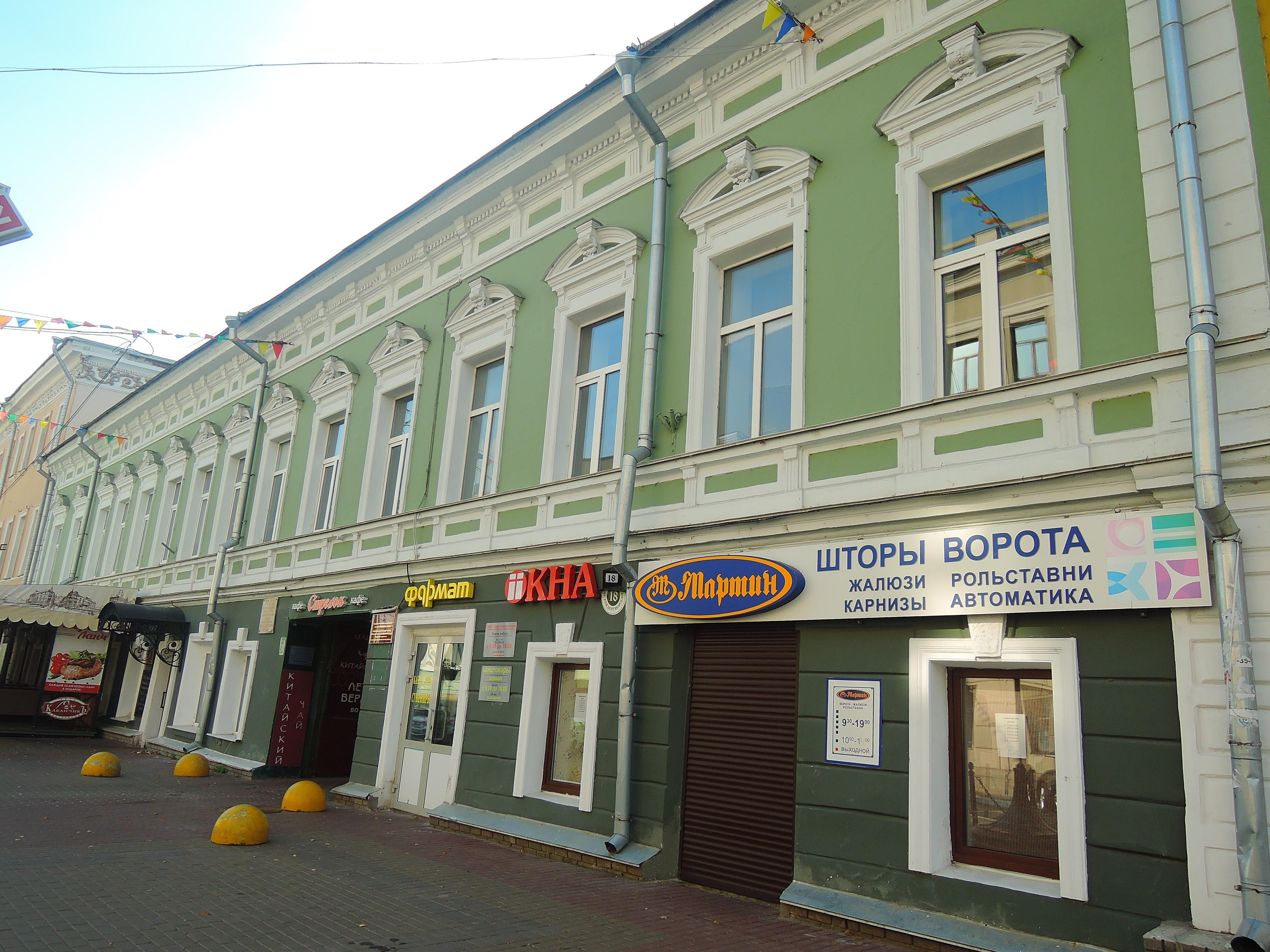 Дом, в котором жил революционер Е.А.Дунаев: улица Рождественская, 18, Нижний Новгород, Нижегородская область